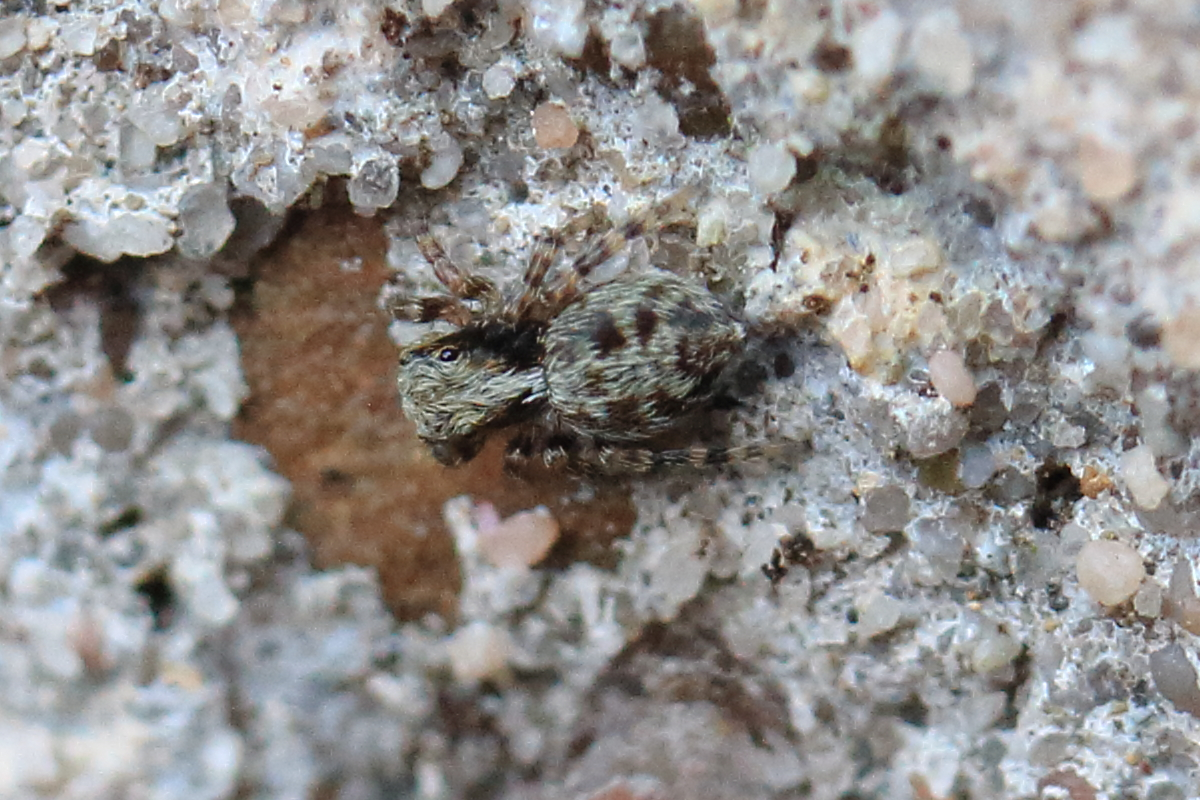 Springspinne Pseudeuophrys lanigera, ca. 3mm, gefunden im Inneren eines Terrassen-Blumenkastens Die abgebildete Spinne wurde am 10. September 2015 von Mhohner auf dieser Benutzer Unterseite bestimmt, siehe den angehängten difflink The spider shown here has been identified from Mhohner on this user subpage 2015, September 10th, see difflink below difflink